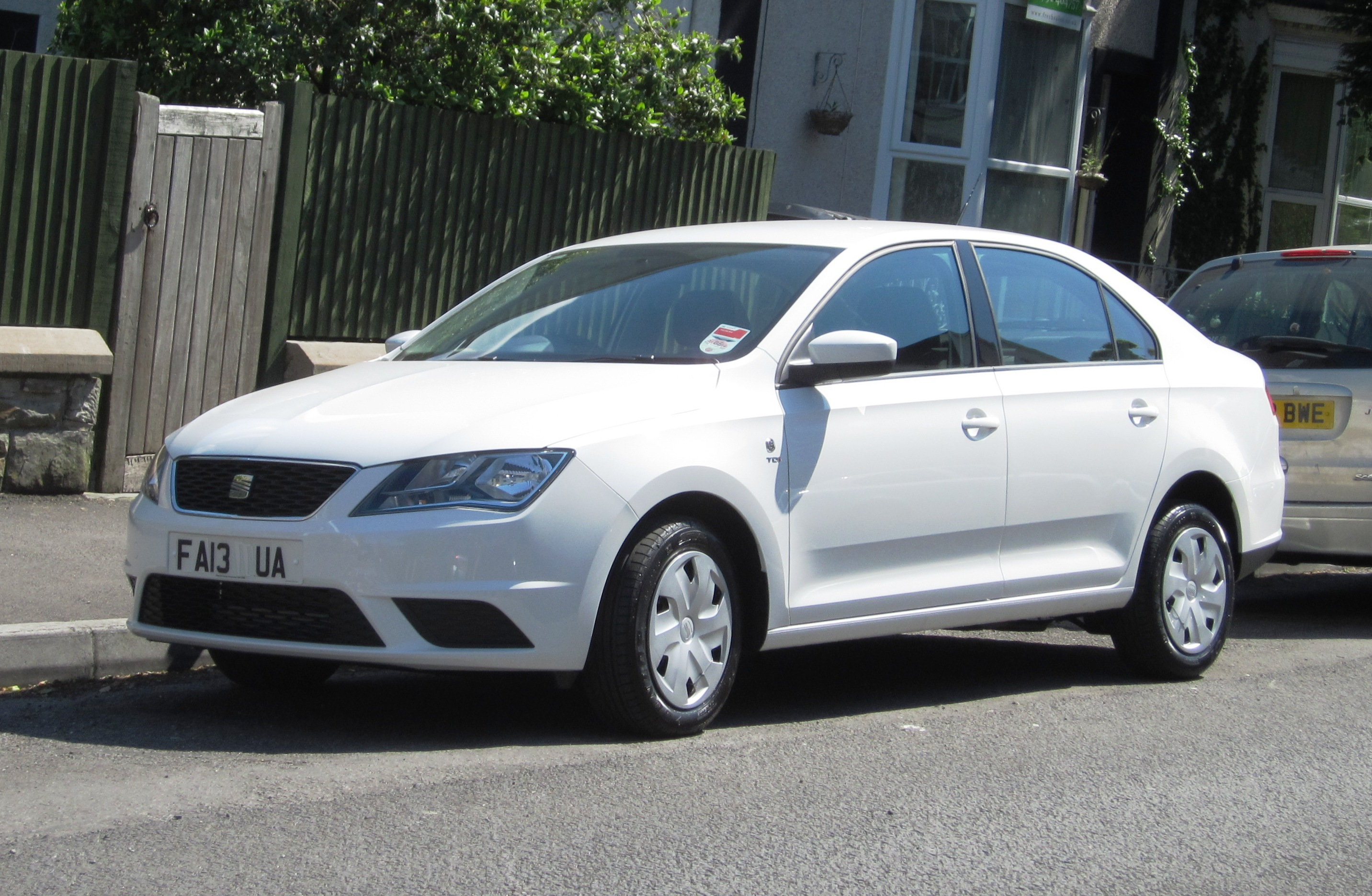 Seat Toledo (edition Skoda) immat 2013